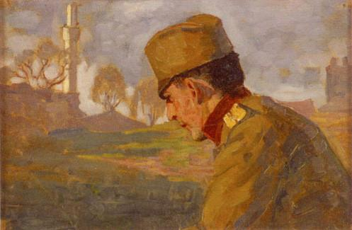 Српски (ћирилица): Портрет Живорада Настасијевића, аутор: Милош Голубовић, 1917. године